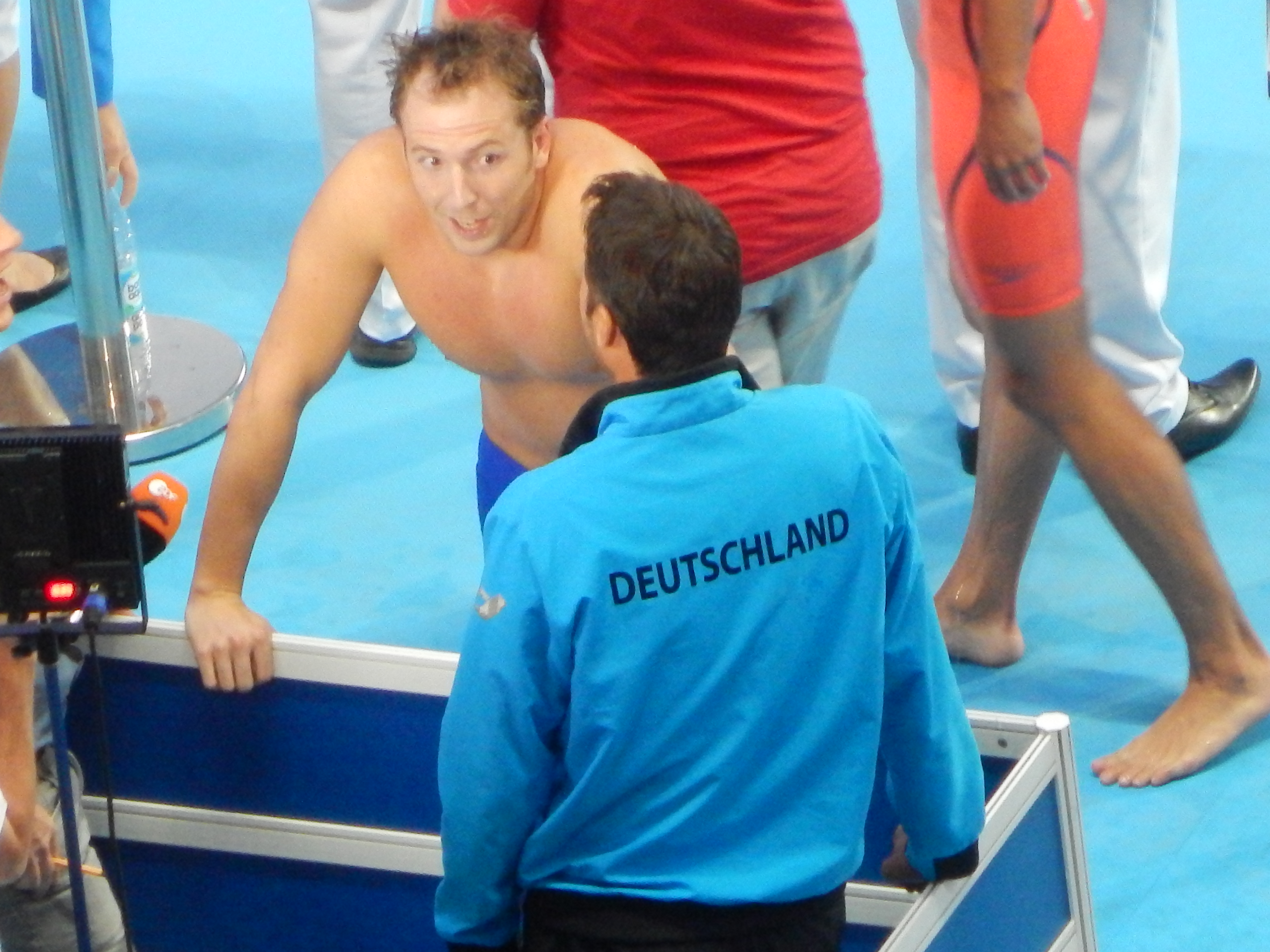 Марко Кох после победы на чемпионате мира в Казани